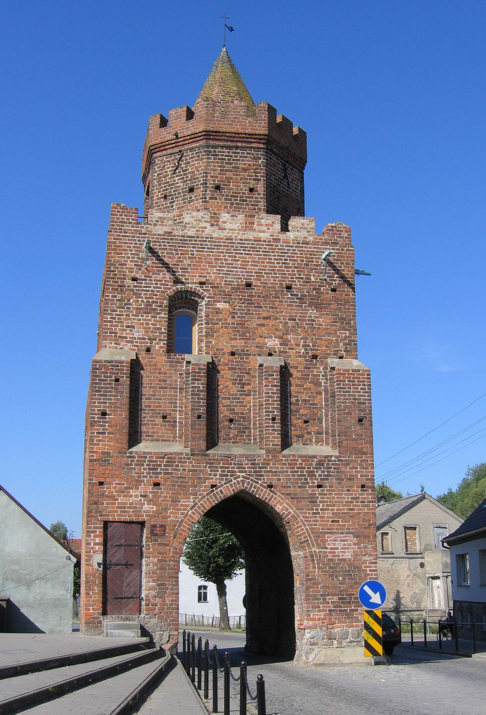 Lipiany - Brama Pyrzycka w zespole murów obronnych